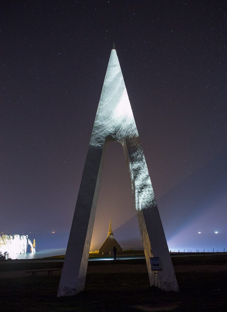 Monument Nungesser et Coli, chapelle Notre Dame de la Garde et en arrière plan la Porte d'Amont et l'Aiguille d'Étretat puissamment éclairés, tout comme la mer au large, et le ciel.